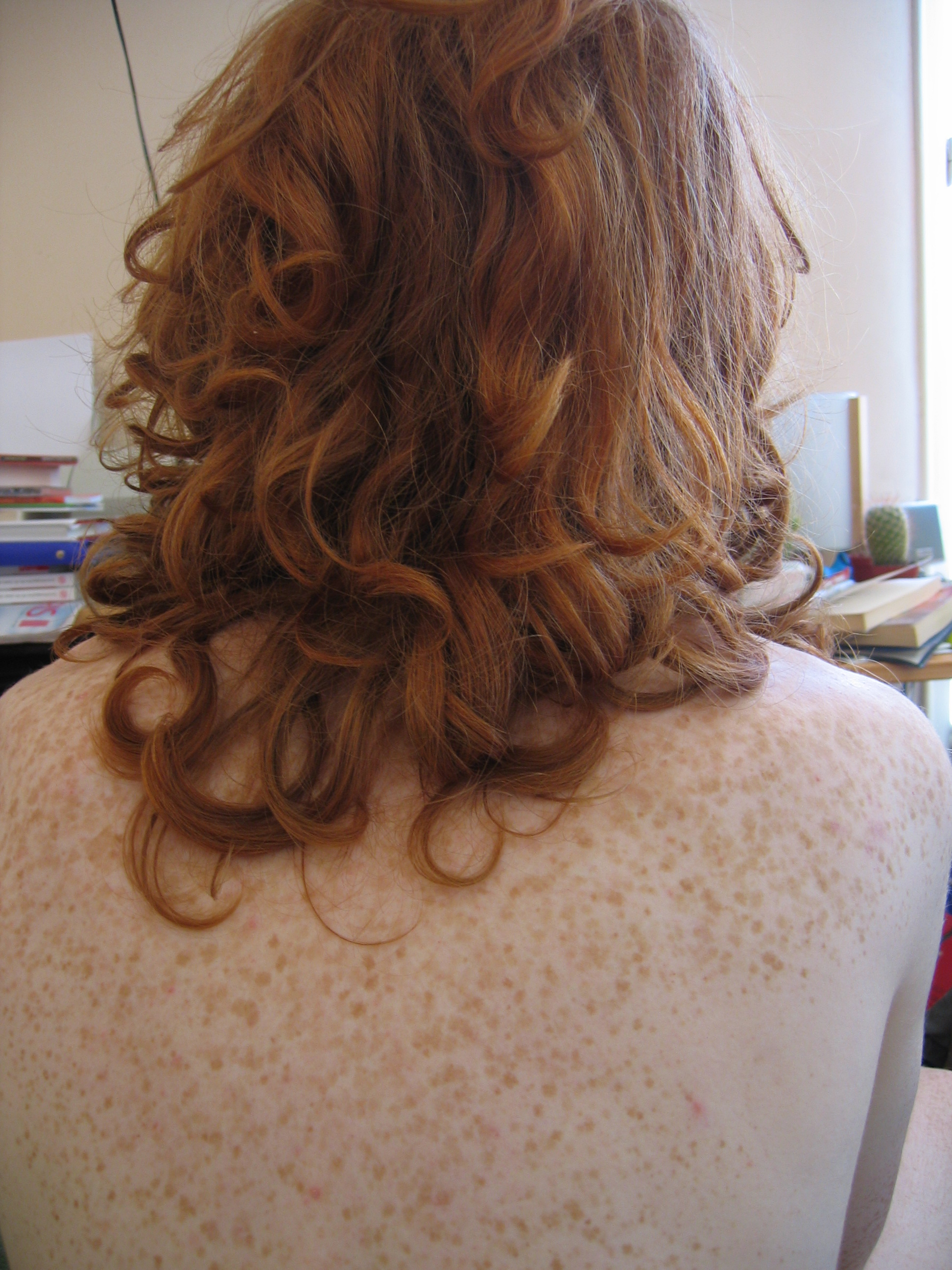 Zdjęcie piegowatej, jasnej skóry, jasnych włosów, oparzenia słonecznego English | Polski | +/−